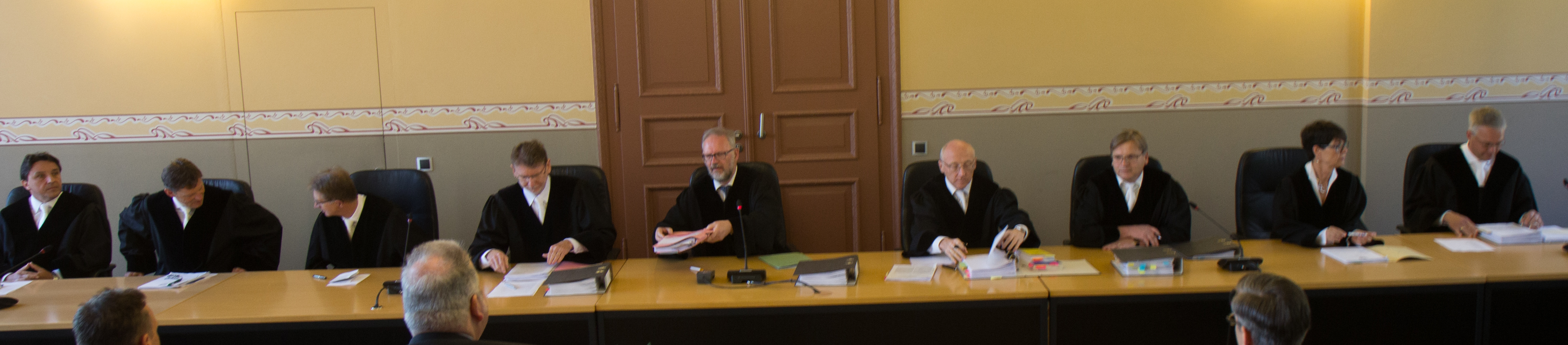 Thüringer Verfassungsgerichtshof. Die Mitglieder des Gerichtshofes zu Beginn der Öffentliche Sitzung am 14. Juni 2017 in Weimar (v.l.n.r. Menzel, Petermann, Schwan, Bayer, Aschke, Baldus, von der Weiden, Heßelmann, Ohler).